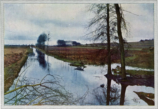 Autochrome in Les Champs de bataille de la Marne par Gervais-Courtellemont intitulée : Marais_de_st-Gond, bibliothèque municaple de Reims sous la référence :_RG_38_N°5_p71.j